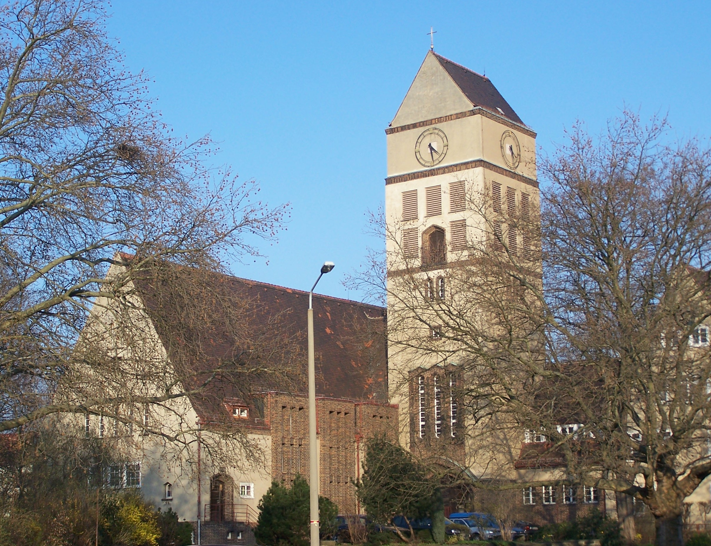 Apostelkirche in Dresden-Trachau, Architekt: Oswin Hempel